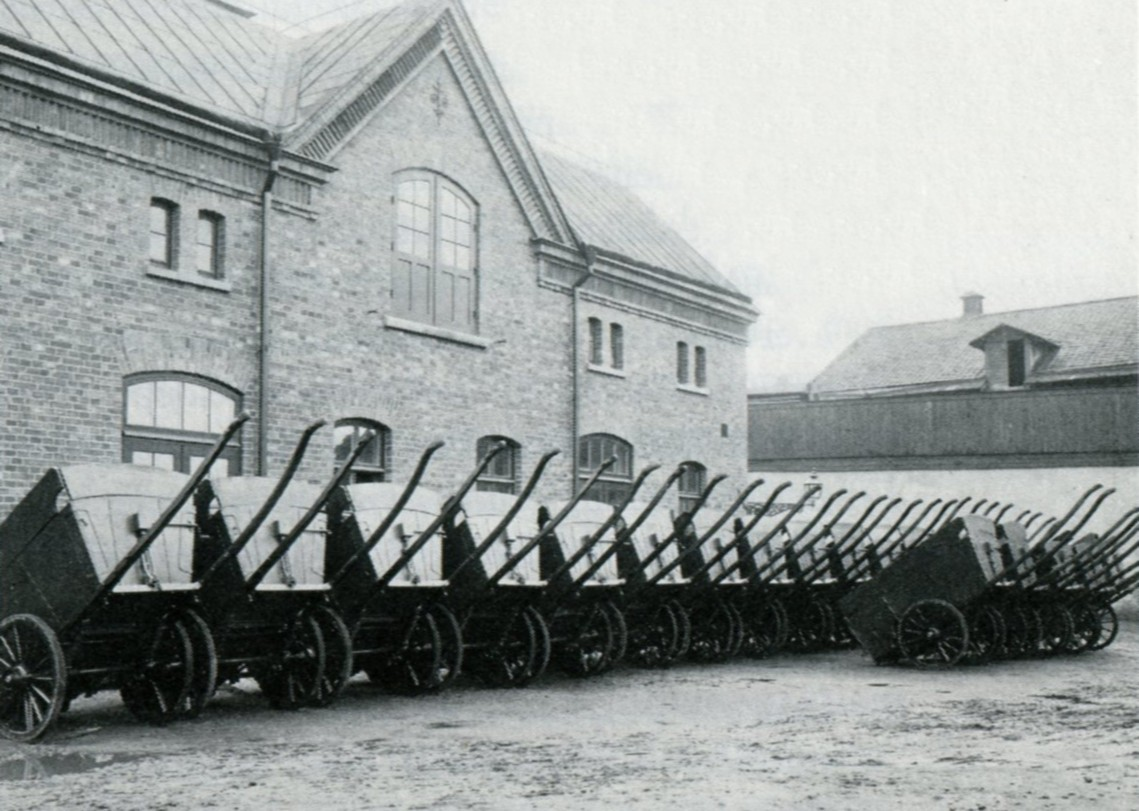 Stockholms "Västra renhållningsstation" Norrbackagatan 31